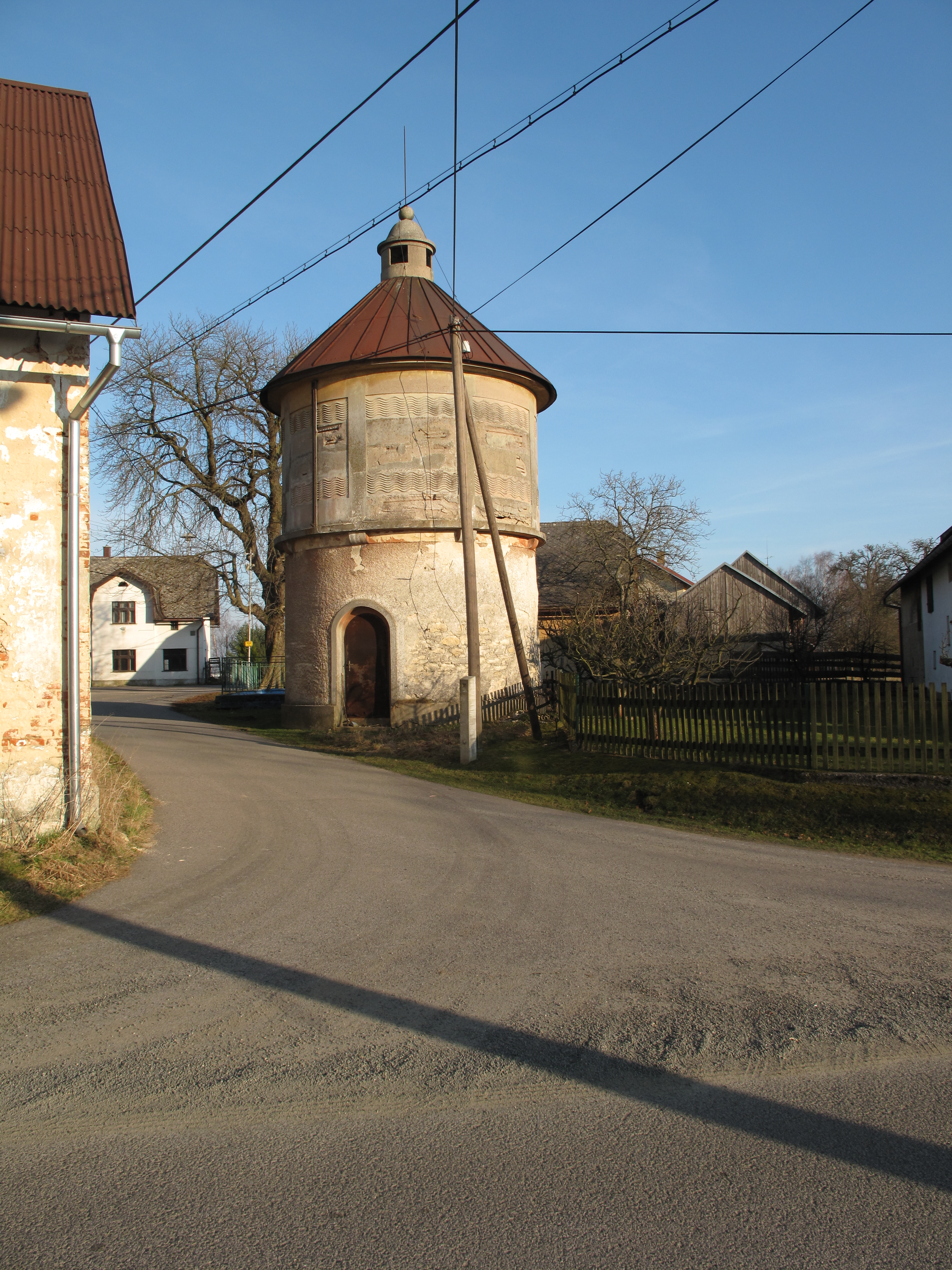 Stará vodárna ve Vrtkách. Okres Liberec, Česká republika.